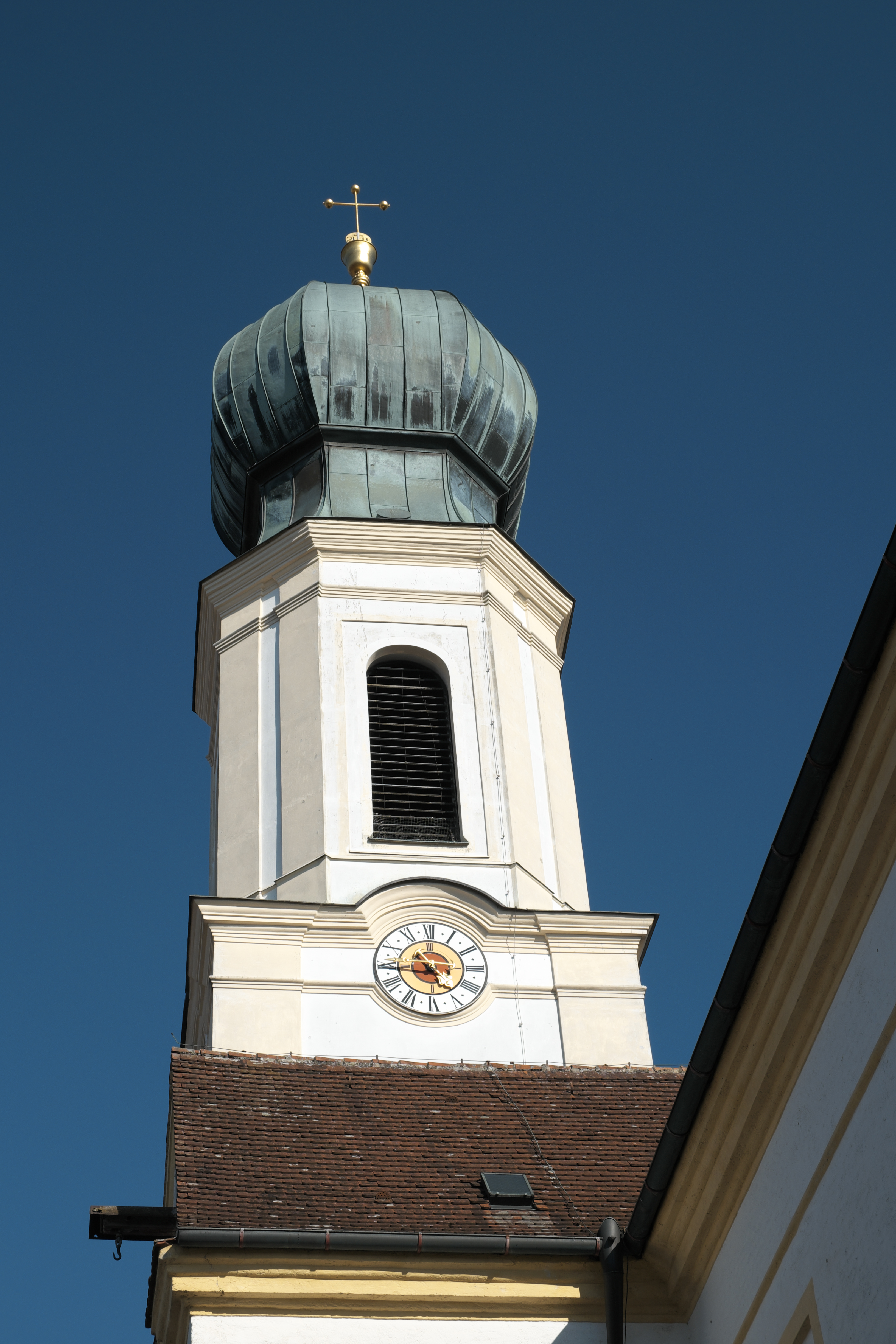 Katholische Pfarrkirche St. Sixtus in Moorenweis im Landkreis Fürstenfeldbruck (Bayern/Deutschland), Glockenturm mit Zwiebelhaube